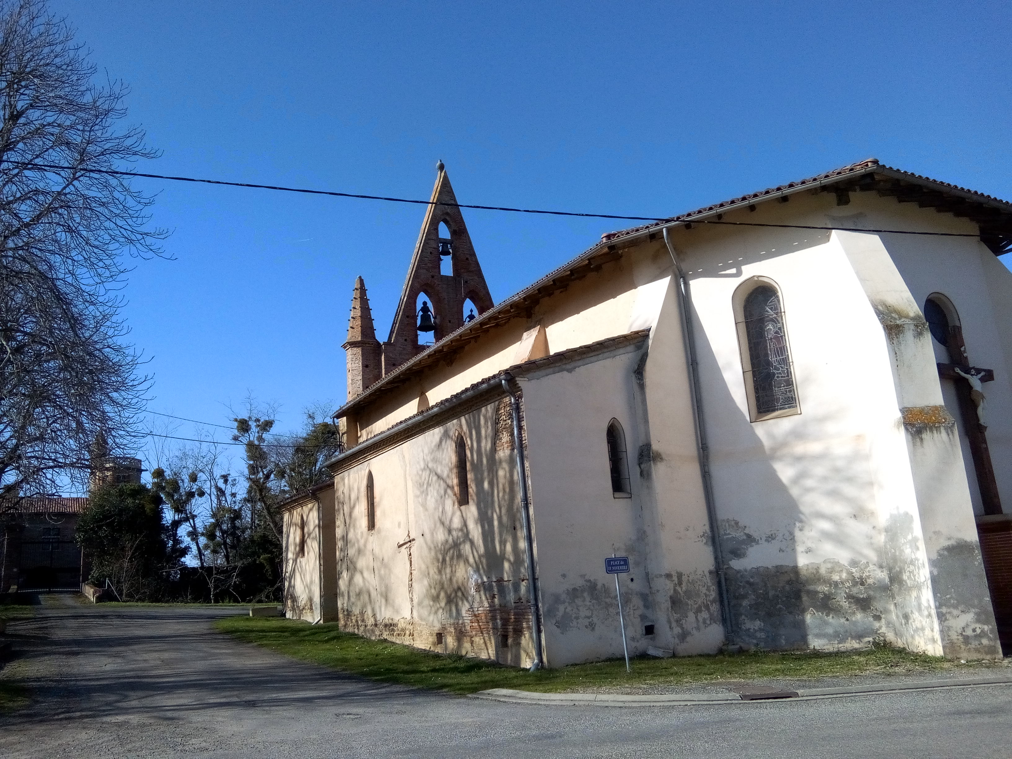 Église de Savères